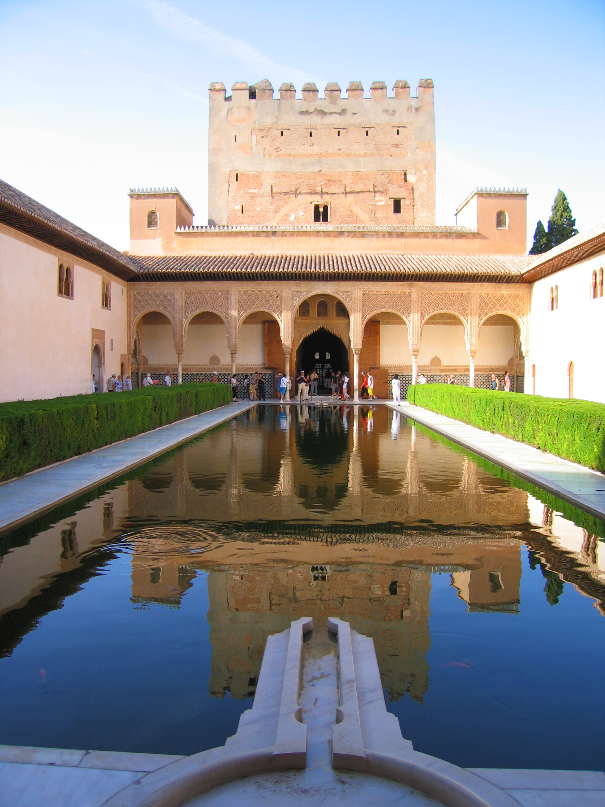 Patio de los Arrayanes